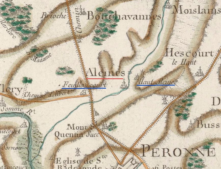 Carte de Cassini